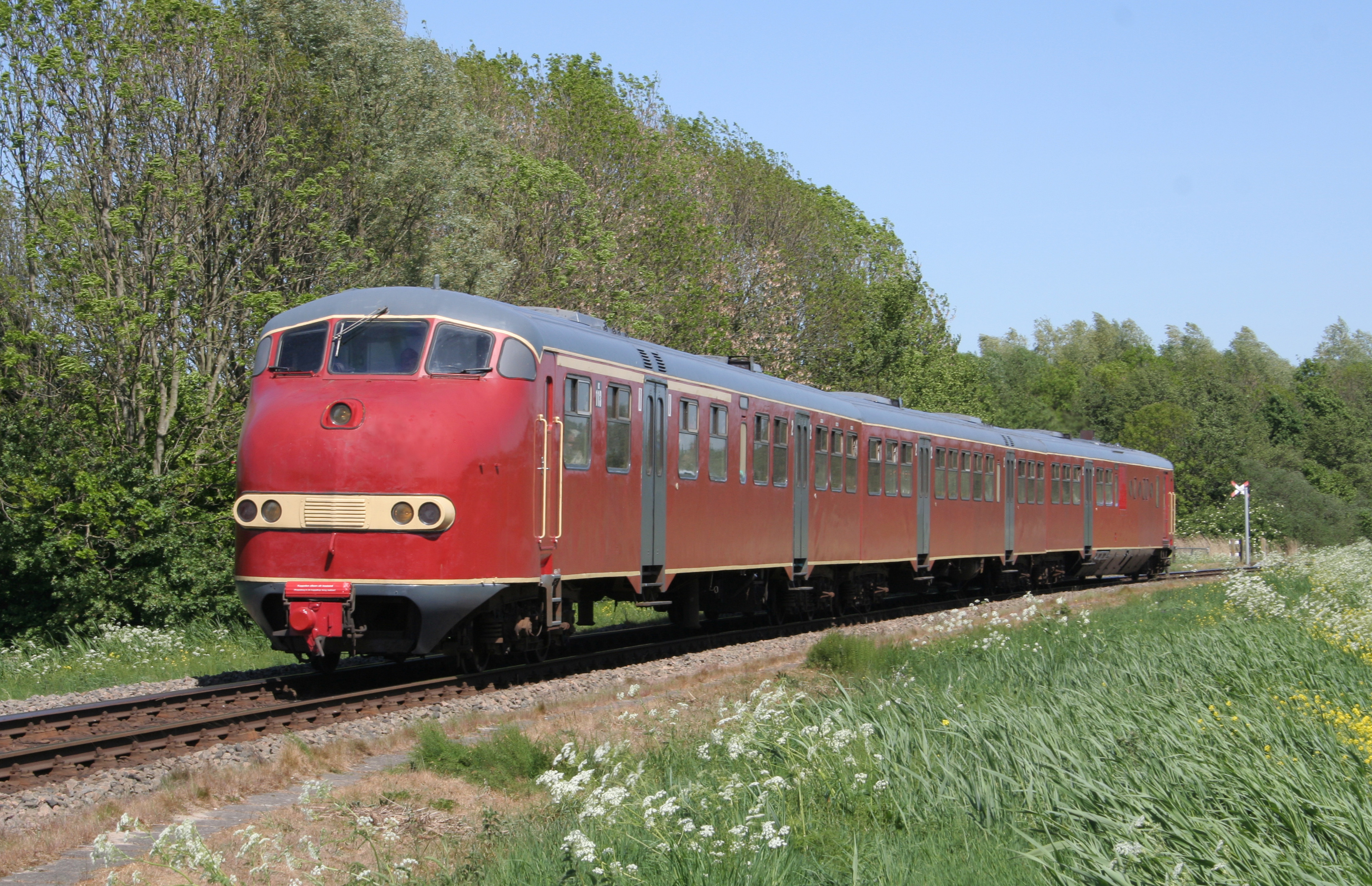 Plan U van HIJSM te Moerdijk, Industrielijn.